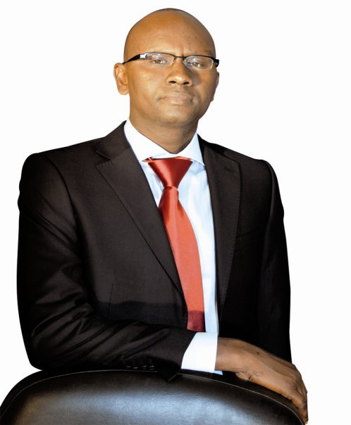 Le Maire des Parcelles Assainies